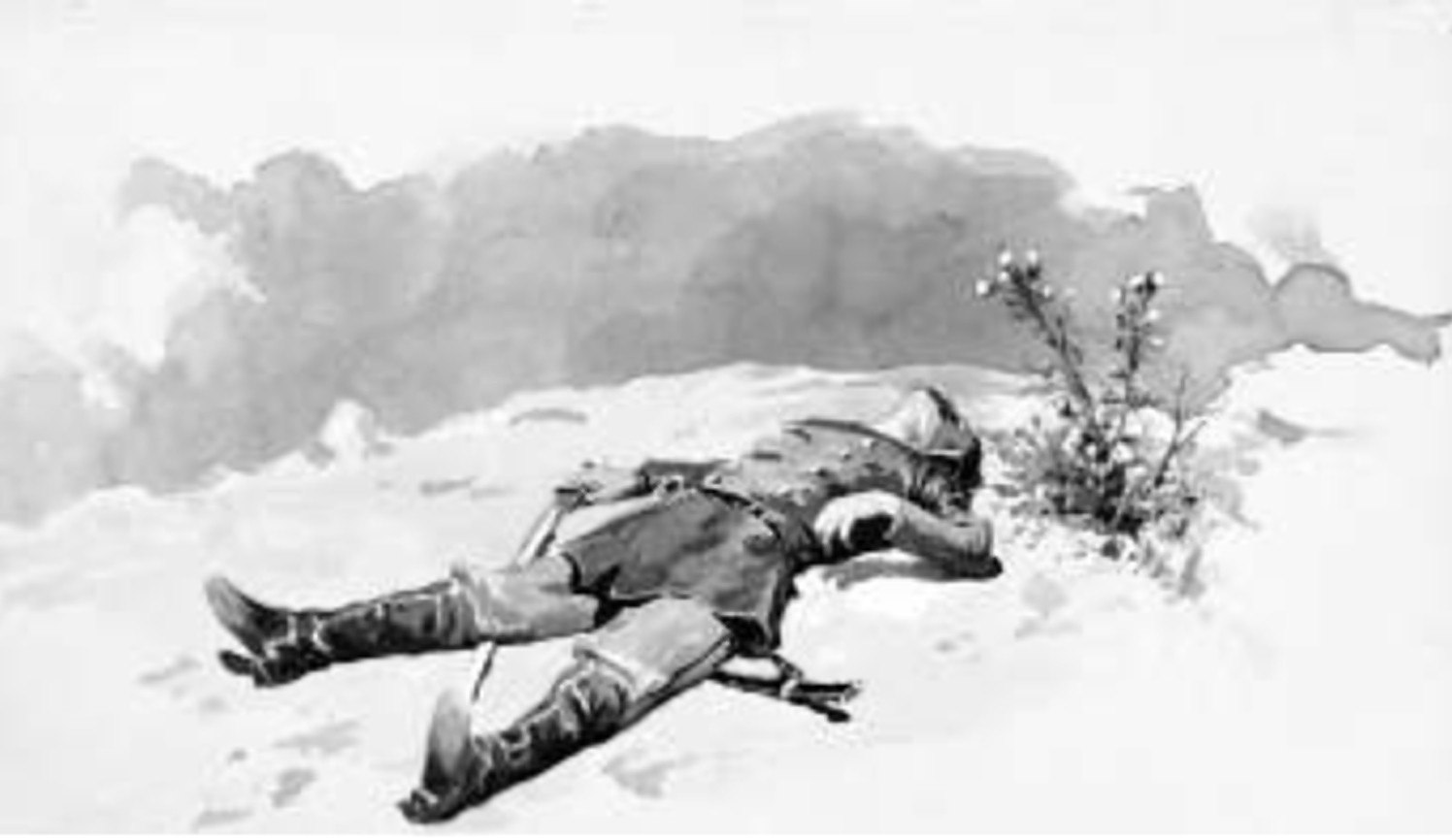 С.В.Иванов. Иллюстрация к стихотворению М.Ю. Лермонтова "Сон"